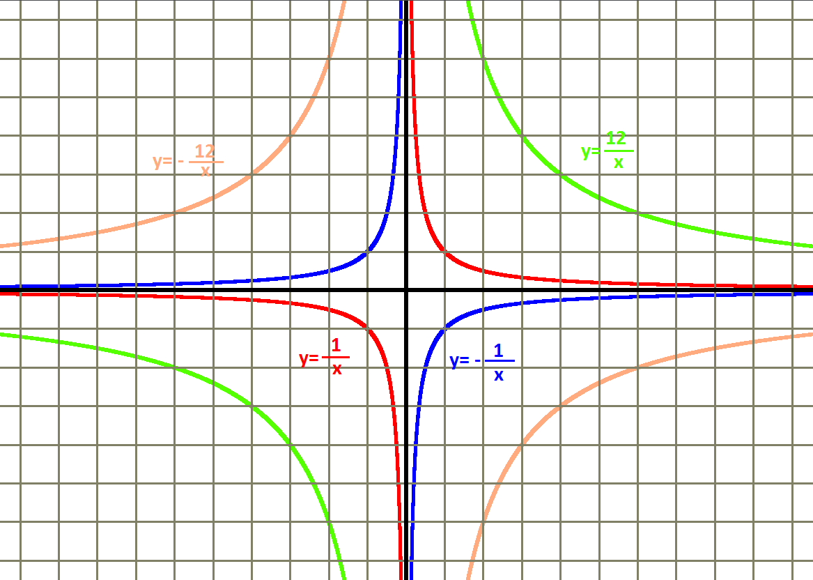 Графики нескольких функций - обратных пропорциональностей.